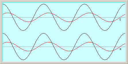 Las curvas de arriba están trazadas en función del tiempo. Las de abajo están trazadas en función de la posición x. out of phase waves. Drawing with variying time and variying distance. 2006